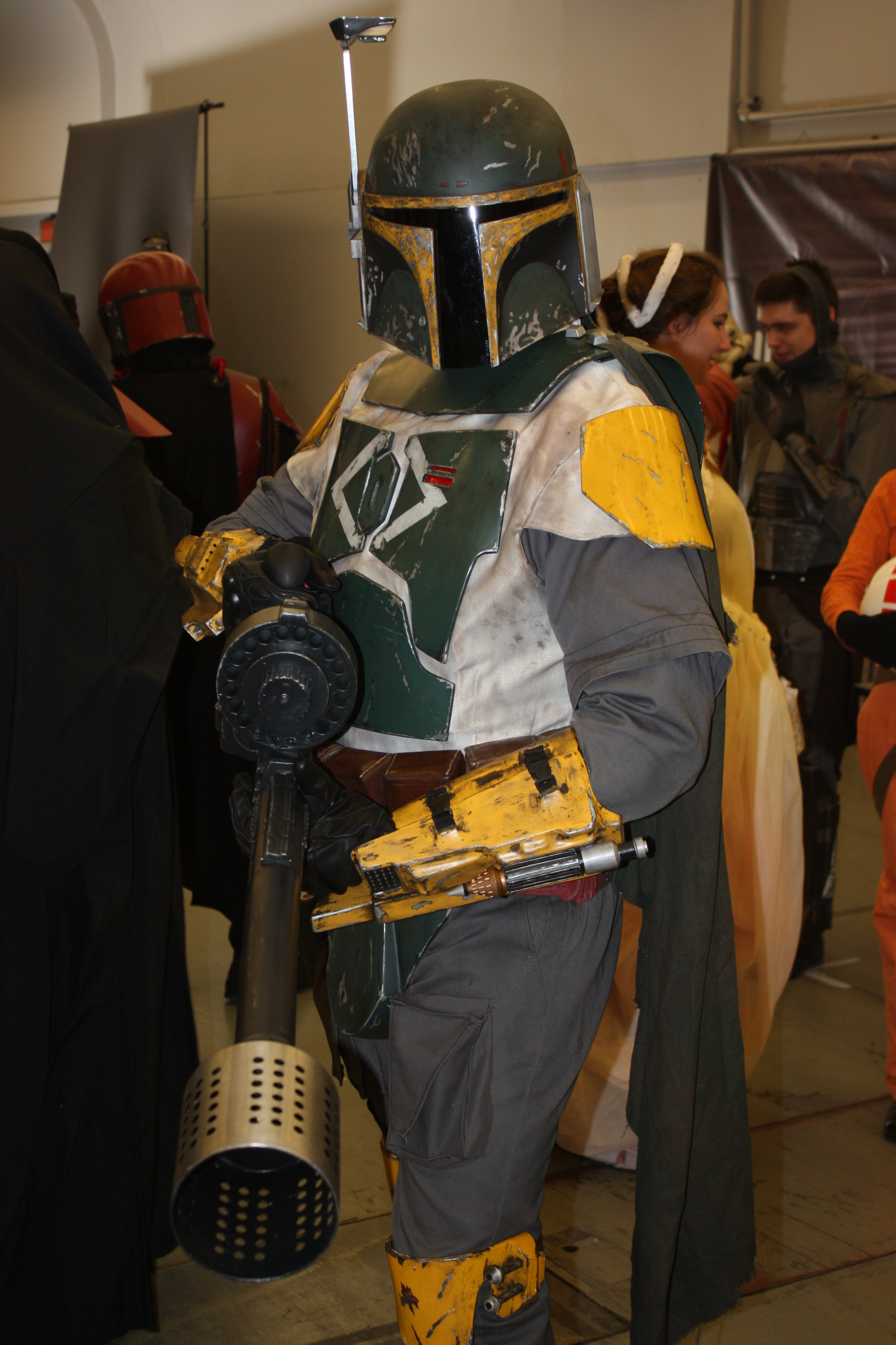 Montreal Mini-Comiccon 2014: Mandalorian